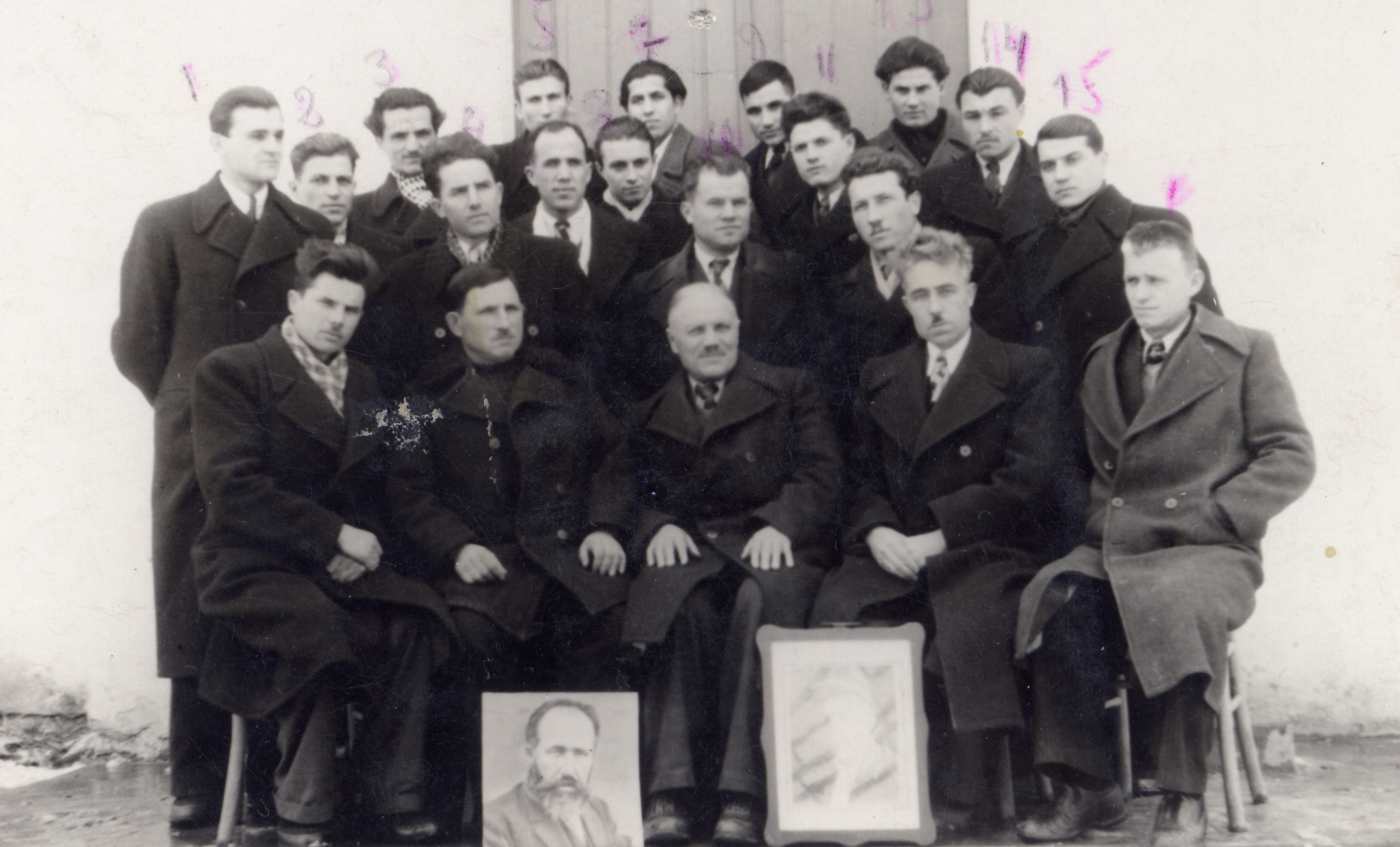 Пенсионираният учител Нино Гачев със свои бивши ученици (отляво надясно): седнали: 1. Дим. Лалов (гимназиален учител), 2. П. Т. Меродийски, 3. Нино Гачев (учител пенсионер), 4. Ник. Кавгаджийски, 5. Минко Хр. Мермерски; стоящи: 1. Мар. Пешев (учител), 2. Георги Савов Цонов (учител), 3. Пешко Рашов (учител), 4. Петър М. Лалов (учител), 5. Спас К. Марков (студент), 6. Фаню С. Кавгаджийски (студент), 7. Паиси С. Кавгаджийски, 8. Ив. Стоянов Пеев (студент) 9. Тодор П. Меродийски (студент), 10. Видол Д. Меродийски (учител), 11. Васил Д. Меродийски (студент), 12. Тодор Ив. Меродийски (учител), 13. Ник. Д. Меродийски (студент), 14. Тод. Ст. Лазаров, 15. Любен Н. Гачев.